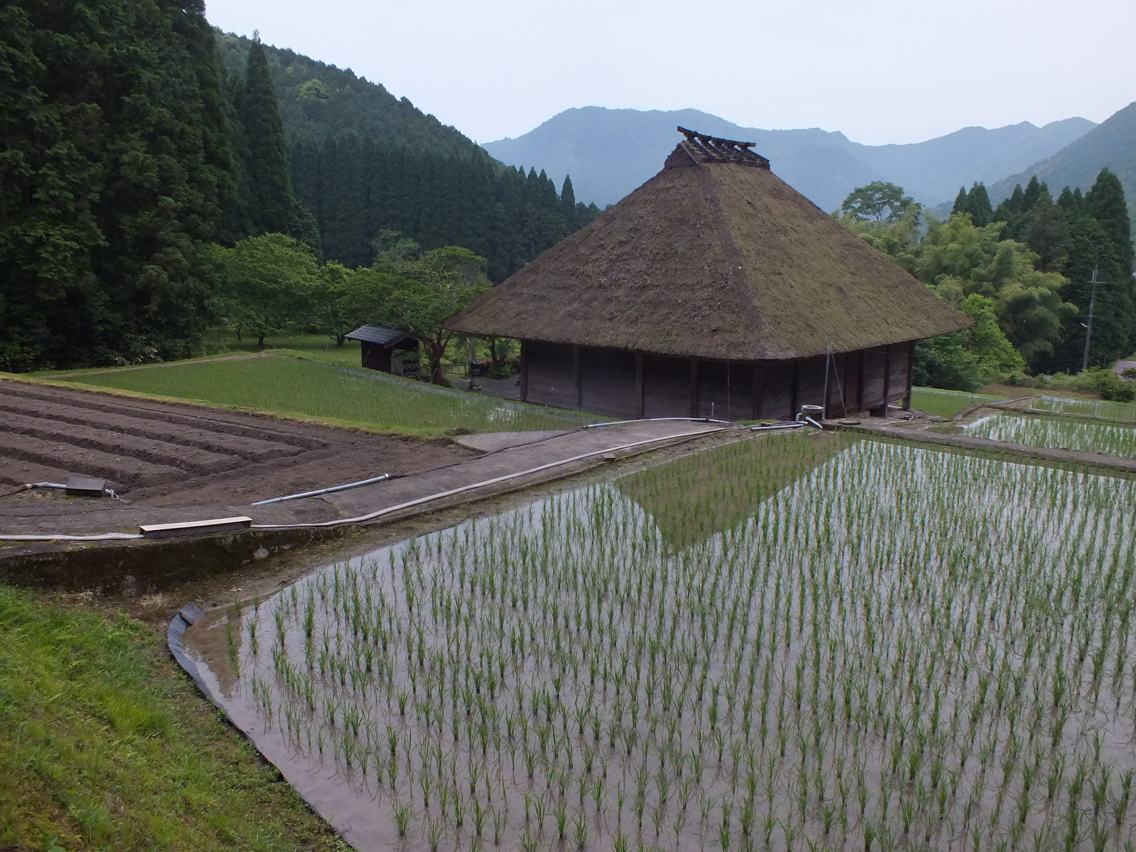 山本薬師堂 所在地 兵庫県丹波市山南町山本628番地 山号 野瀨倉山 院号 佛光寺藥師如來堂 （仏光寺薬師如来堂） 中興年 1395年（応永2年） 正式名 野瀨倉山佛光寺 藥師如來堂 別称 山本の薬師堂